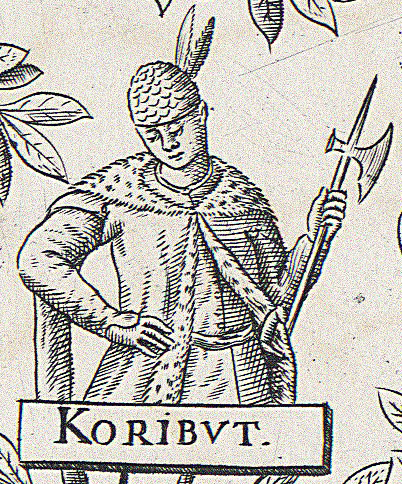 Беларуская (тарашкевіца): Уяўны партрэт князя Карыбута (Karybut)